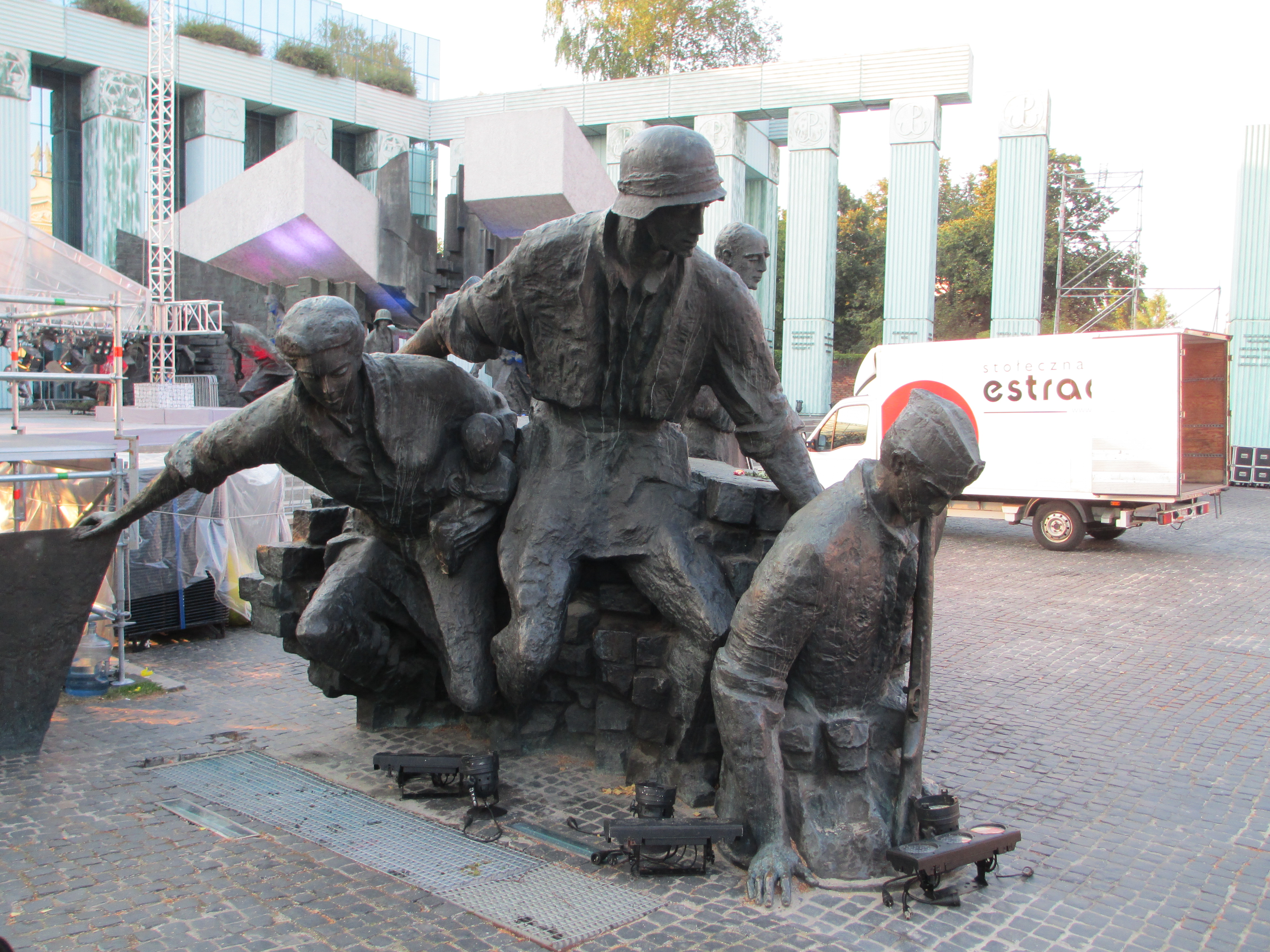 אנדרטה בוורשה לזכר המרד הפולני בוורשה ב-1944